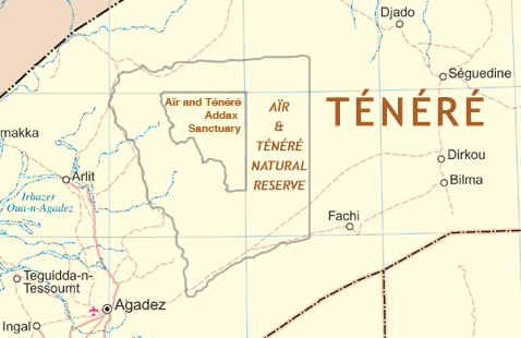 Map of Ténéré